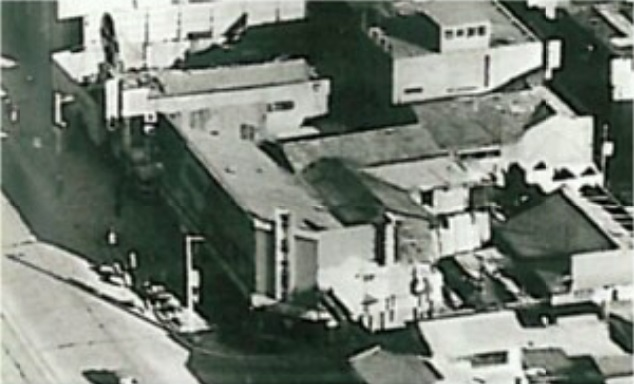 エディオンの母体の一部デオデオの前身、第一産業株式会社の増築時の様子